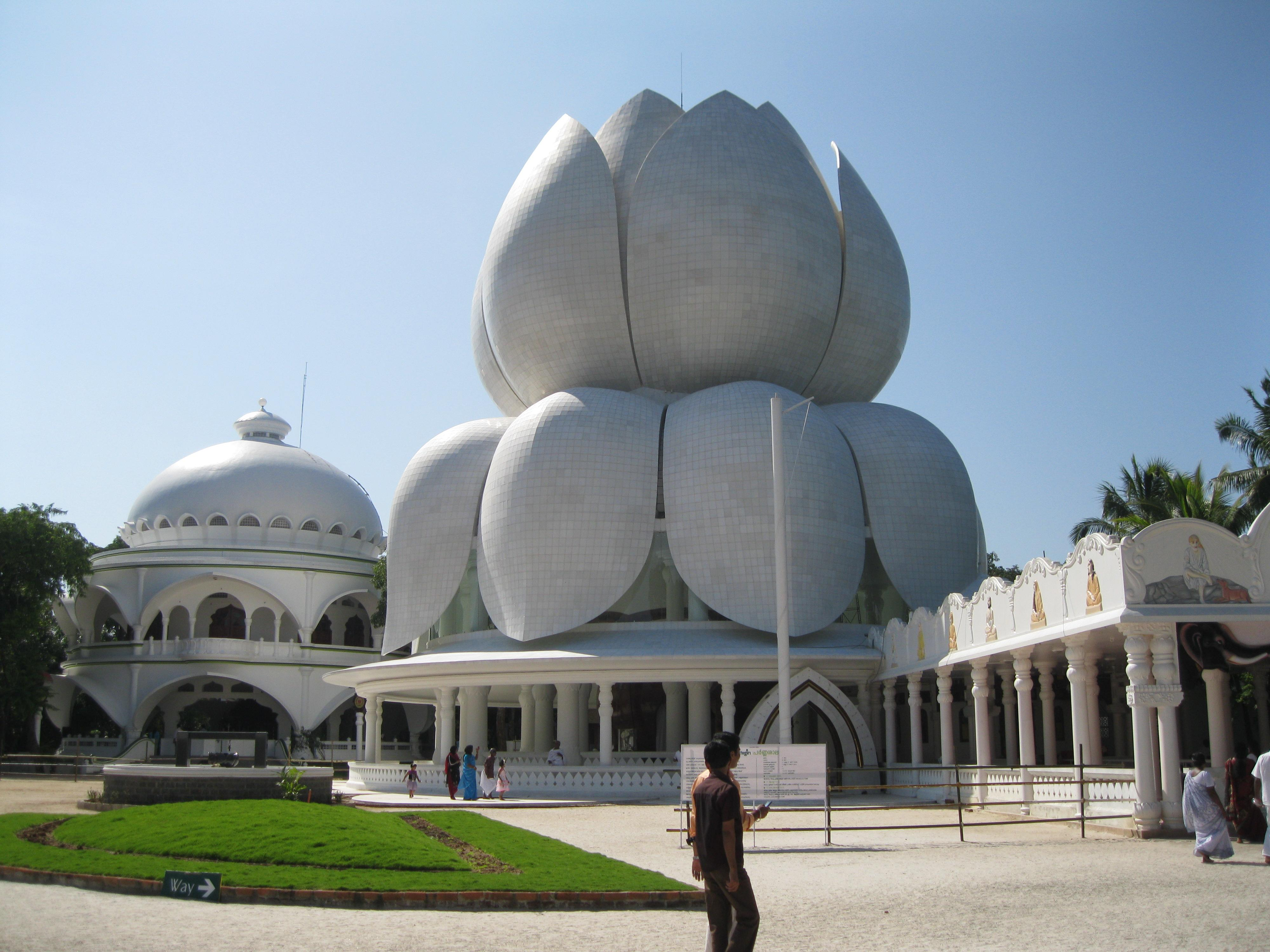 ശാന്തിഗിരി ആശ്രമത്തിലെ പർണ്ണശാല